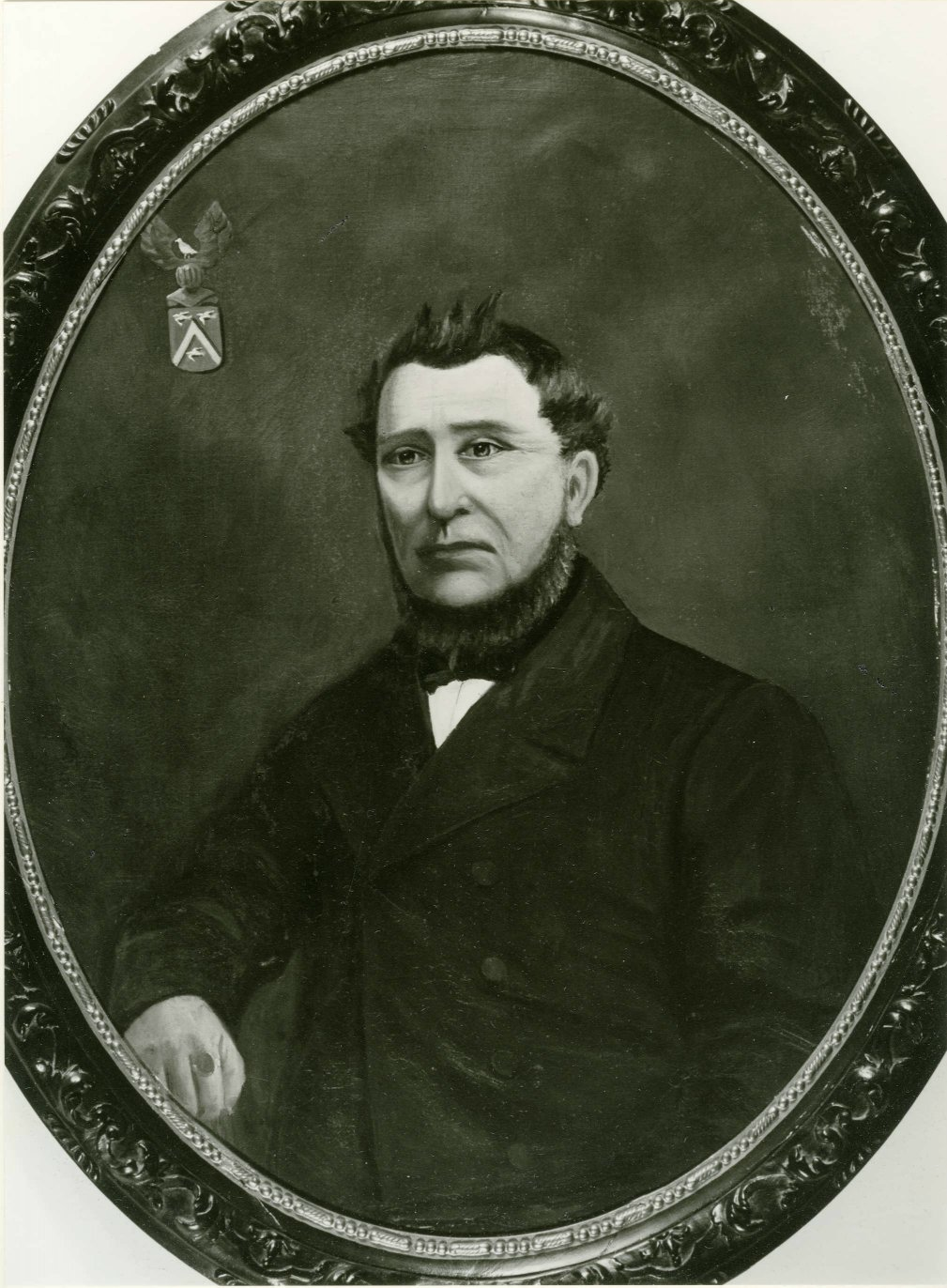 Arnoldus Gelderman, burgemeester van Zuidhorn